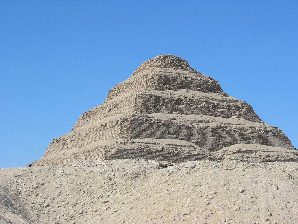 Piramide a gradoni, del faraone Djoser, sita a Saqqara